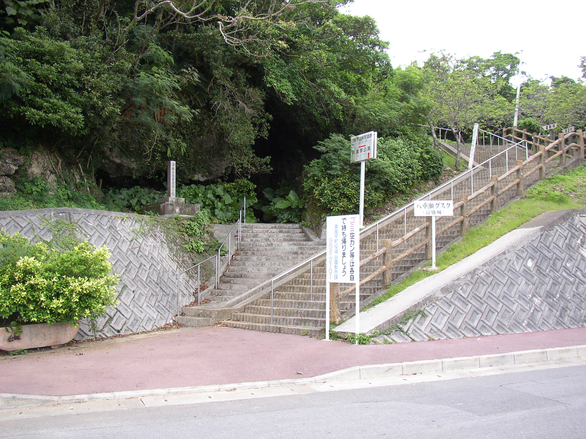 白梅学徒隊が勤務した第24師団第1野戦病院跡（八重瀬町）